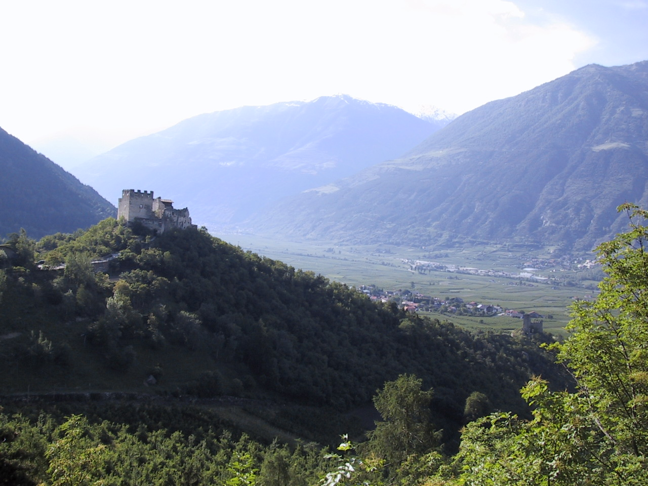 Der Felsenhügel am Eingang in das Martelltal im Vinschgau mit Ober- und Untermontani